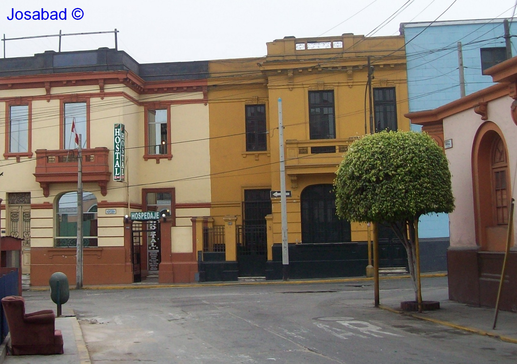 Avenida España vista desde la calle Breña, en el distrito del mismo nombre.